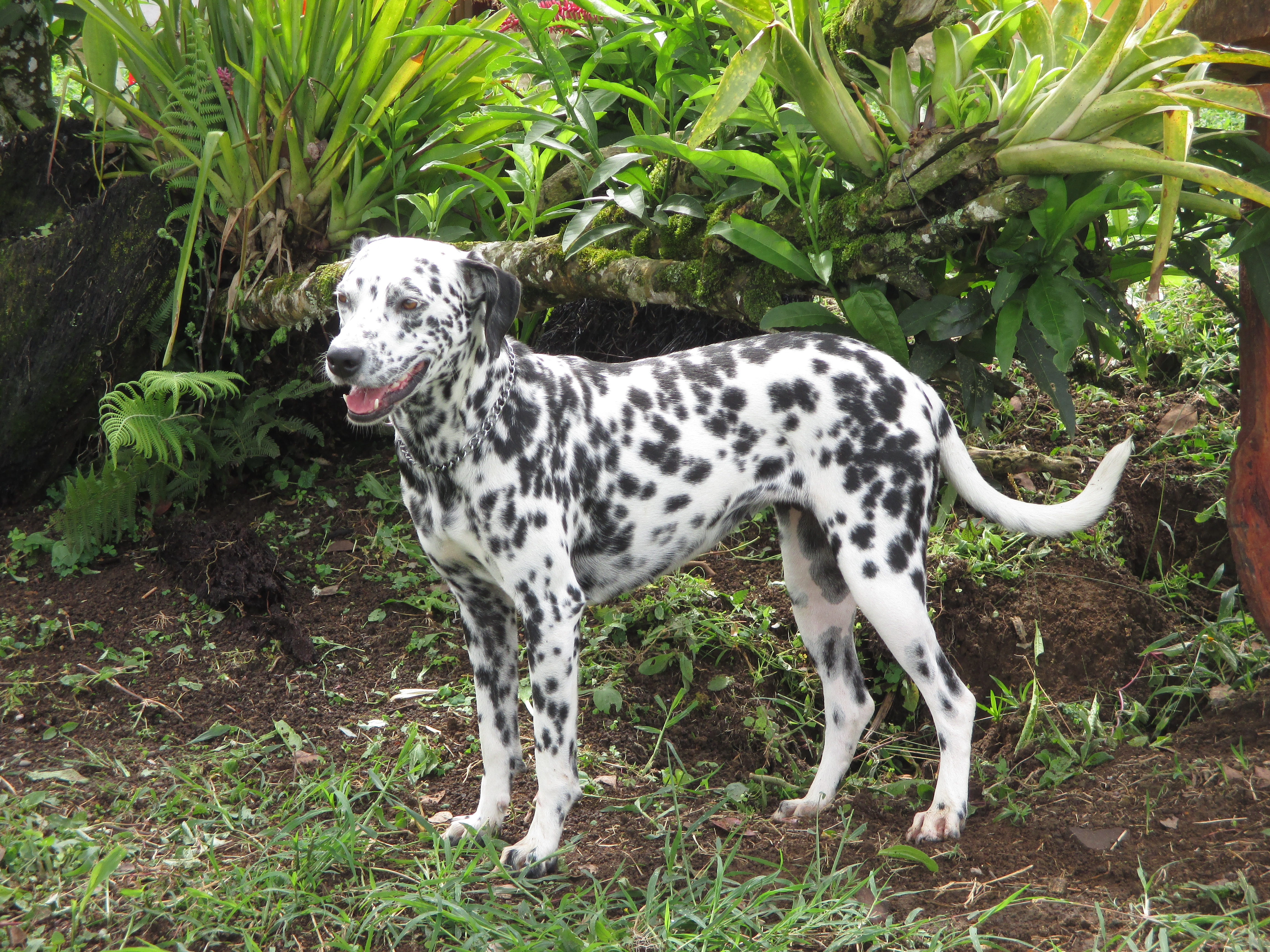 Hermosa captura de "pepas", una perra muy divertida. Esta fotografía fue tomada en el municipio colombiano con código 76111.